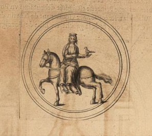 Margaret of Geneva